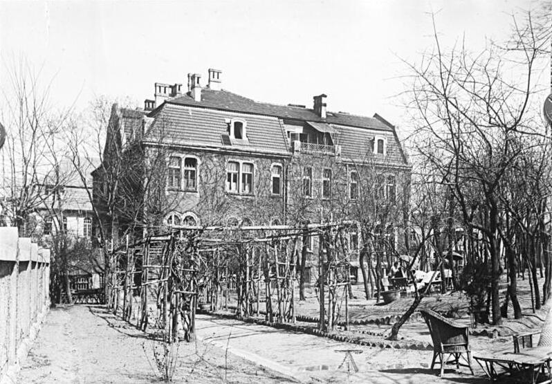 Tsingtau, Hauptgebäude des Faberkrankenhauses China, Tsingtau.- Das Hauptgebäude des Faberkrankenhauses.